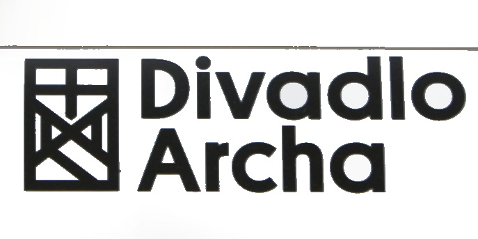 Divadlo Archa